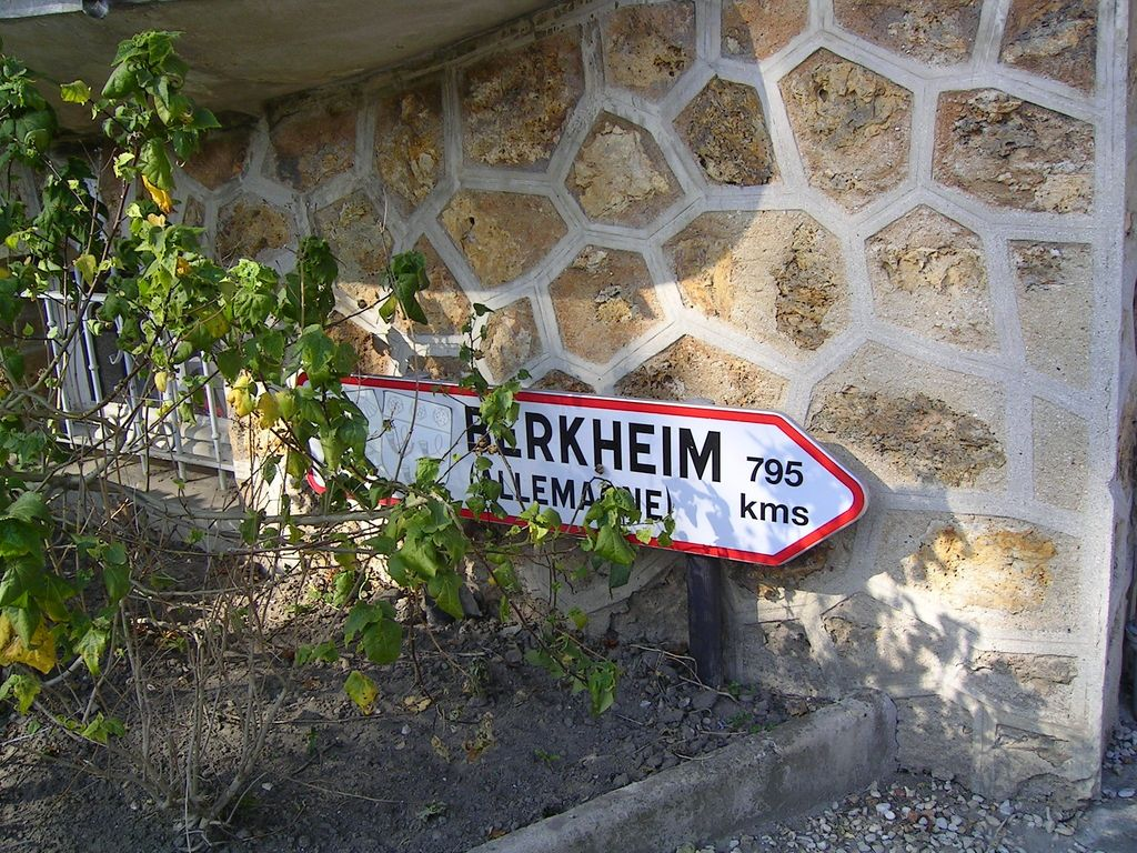 Panneau indicateur de la ville de Berkheim en Allemagne, parc de la mairie Photo personnelle (own work) de Marianna